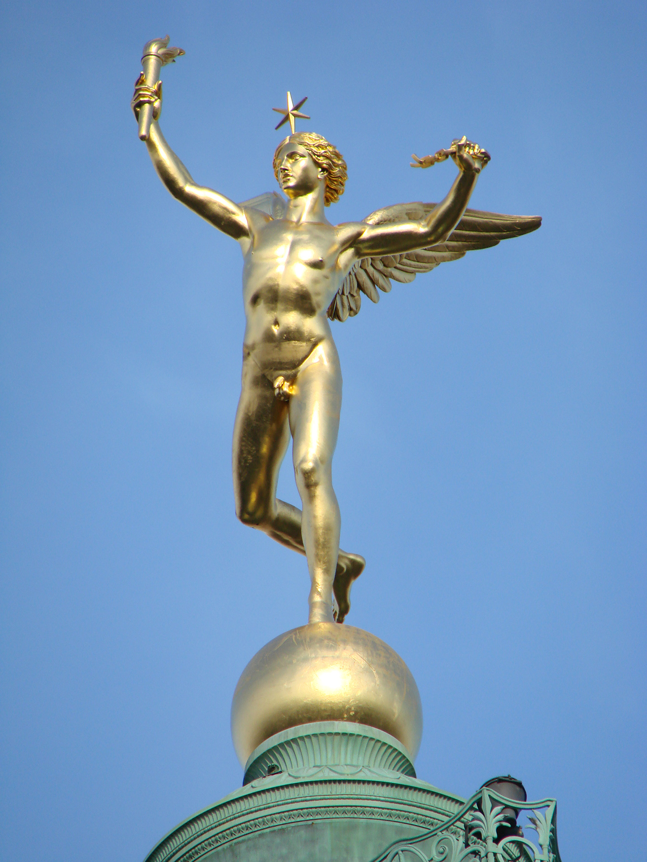 Le Génie de la Liberté, statue d'Augustin Dumont (1801 - 1884), couronnant la colonne de Juillet, sur la place de la Bastille à Paris.